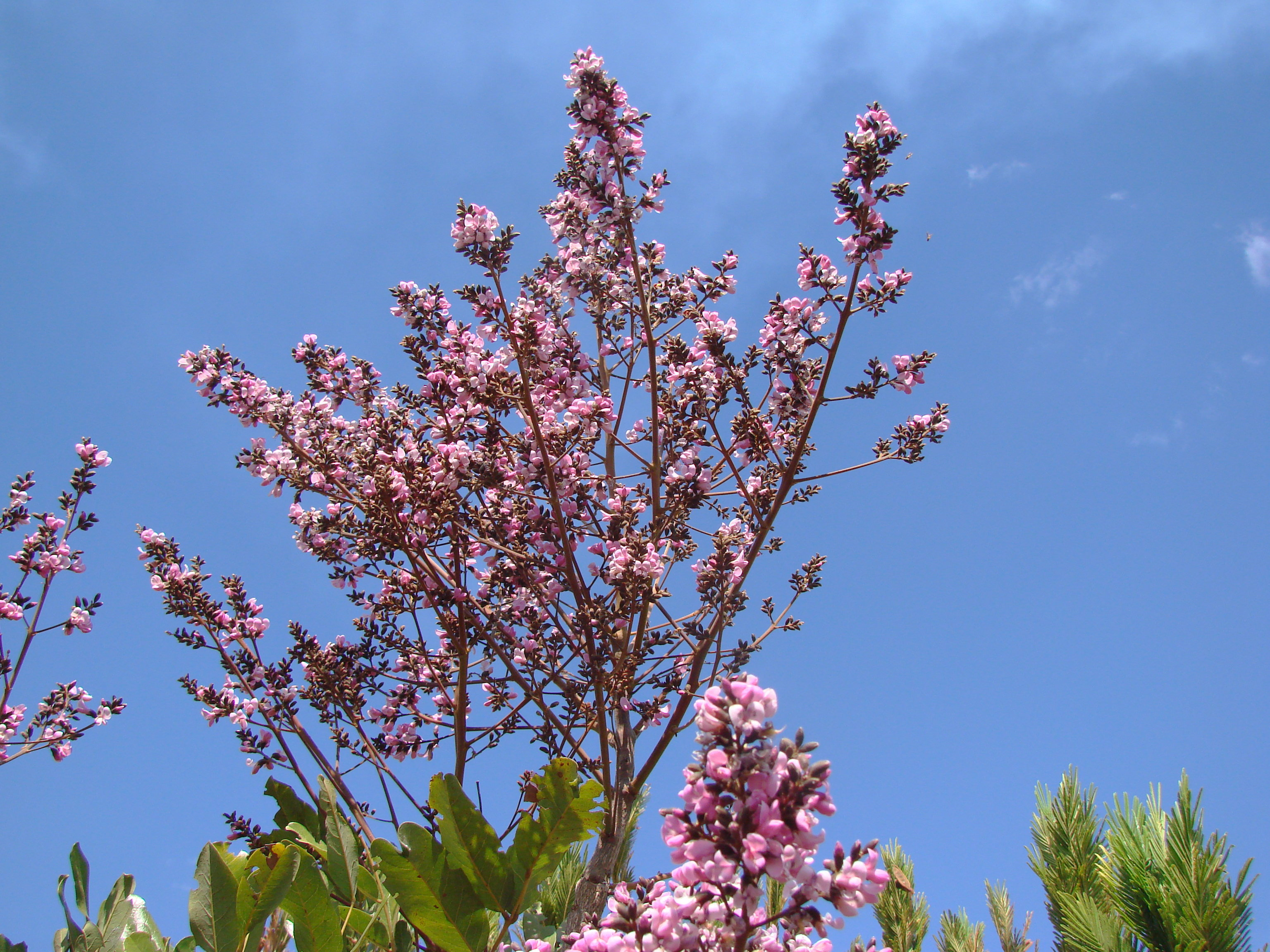 Vatairea macrocarpa, Fabaceae, Faboideae - Brasilien/Brasil: Goiás, Cristalina